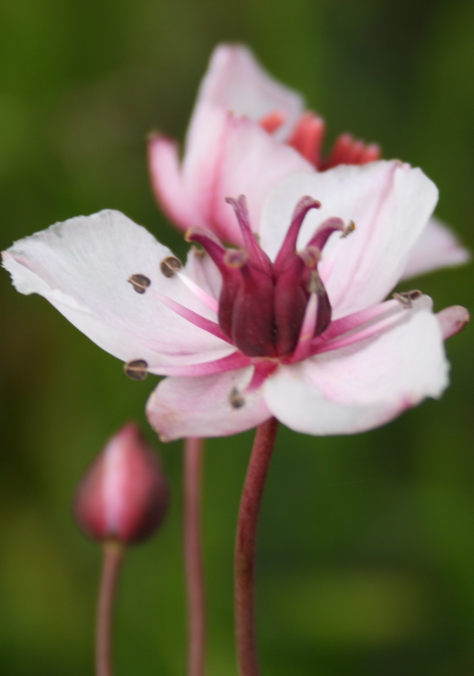 Butomus umbellatus: Flower.